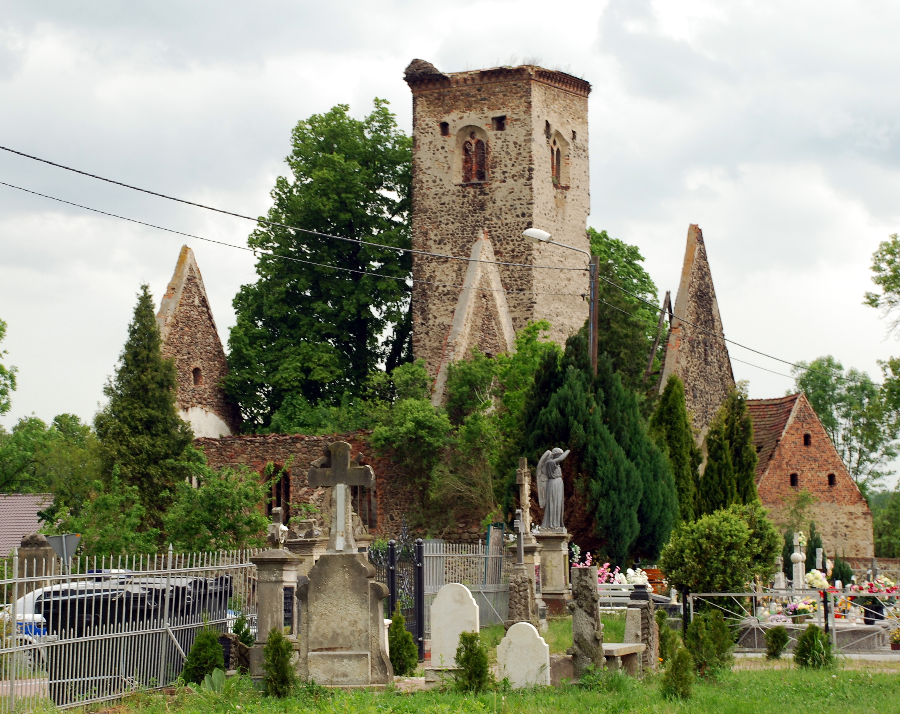 Złotnik, ruina kościoła, XV